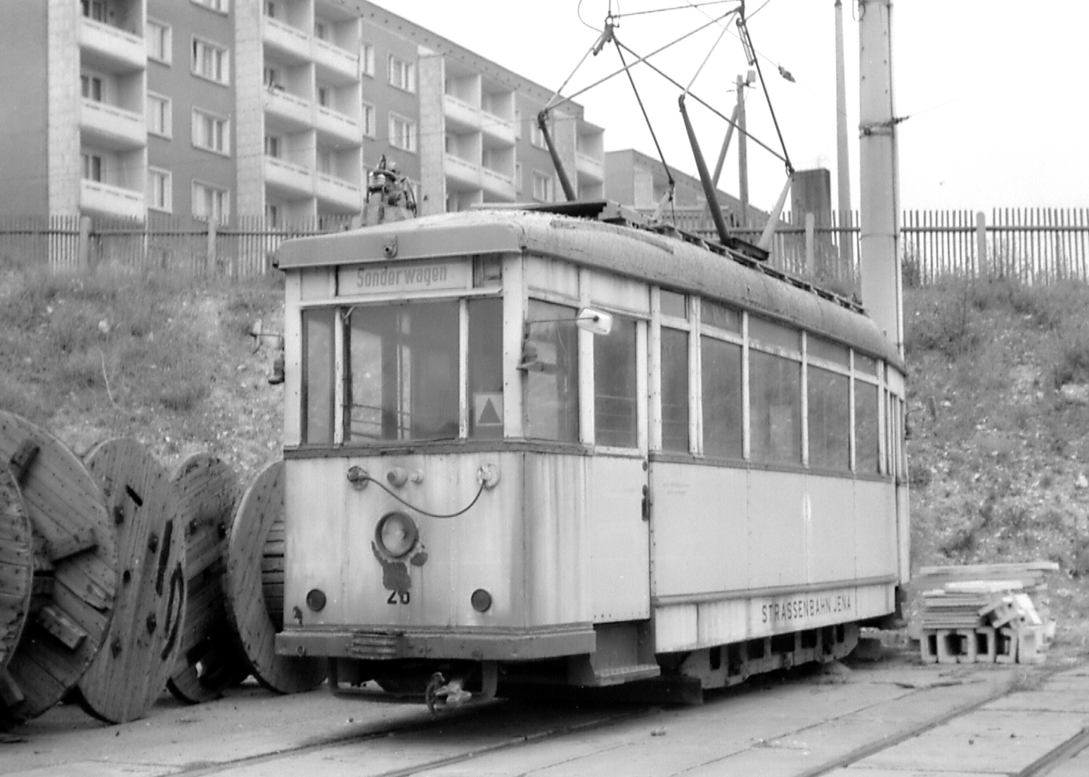 Historischer Triebwagen Nr. 26 der Jenaer Nahverkehrsgesellschaft, ehemals Triebwagen 19 der Straßenbahn Eisenach, vor der Aufarbeitung abgestellt in Jena-Zwätzen, 1979